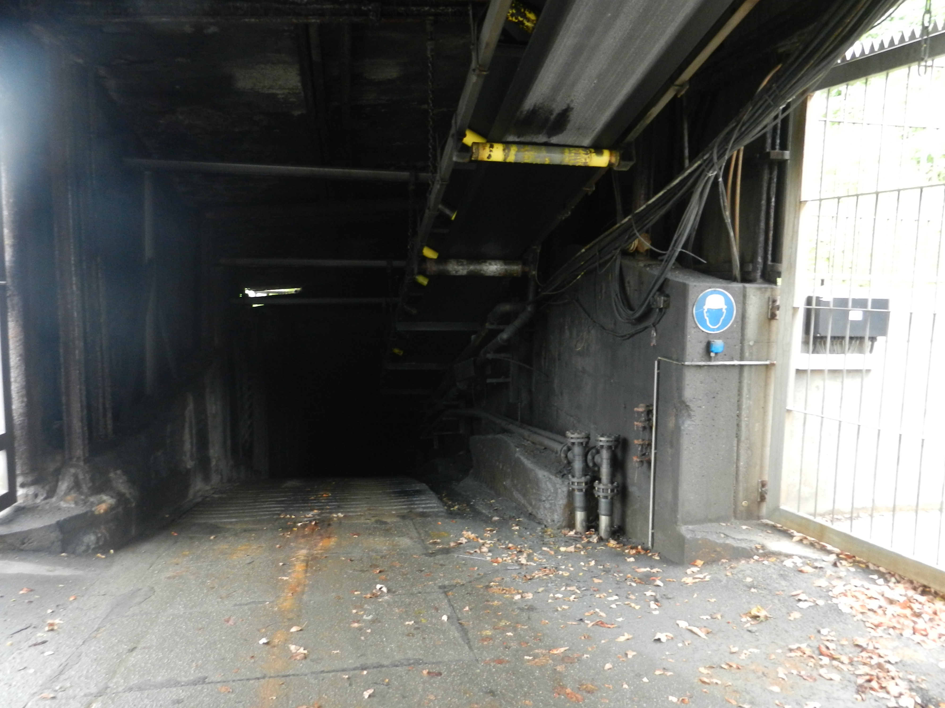 Salzbergwerk Stetten bei Haigerloch, Einfahrt erster Schrägschacht